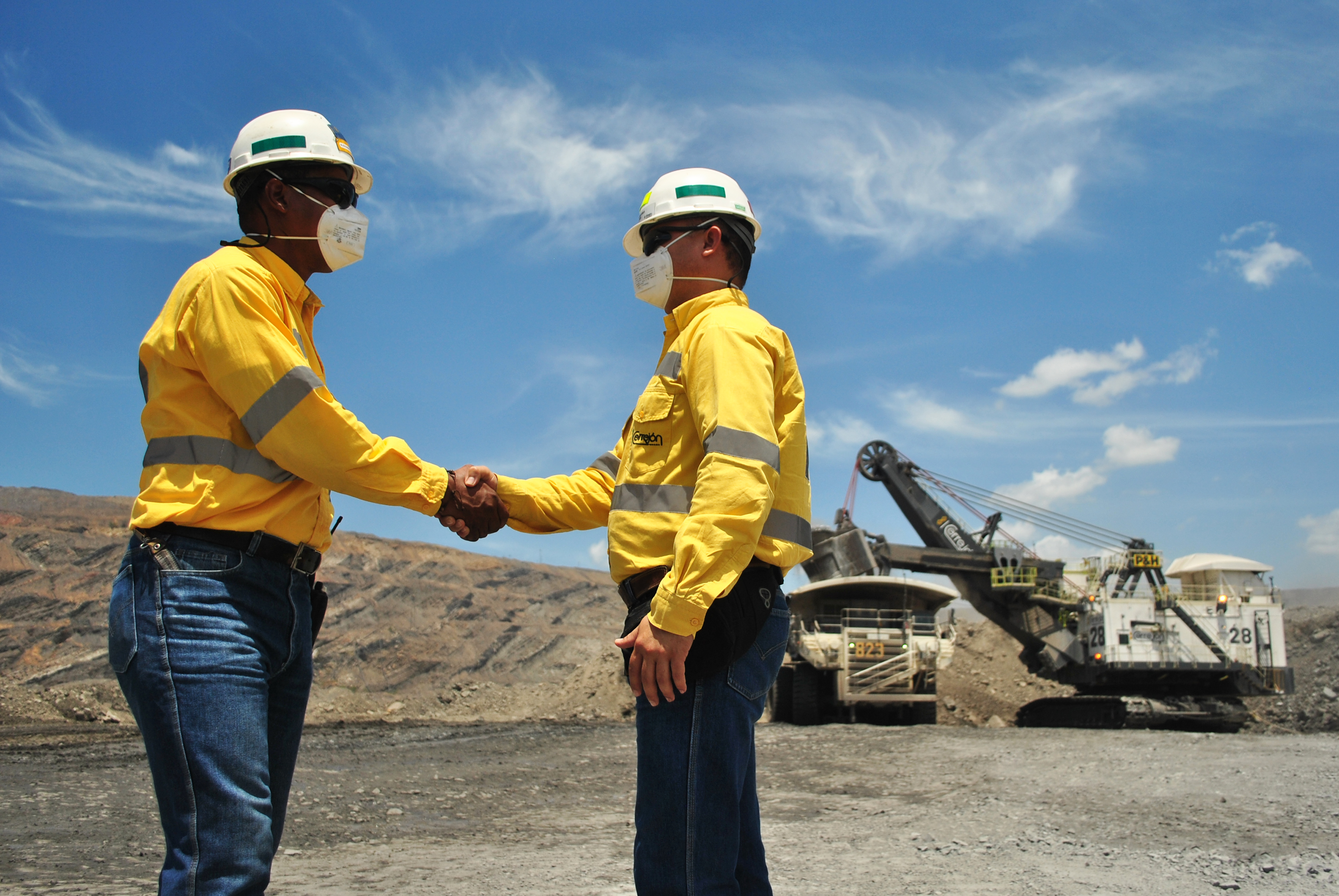 Cerrejón es conocido por sus programas sociales y ambientales, los cuales han merecido premios internacionales.